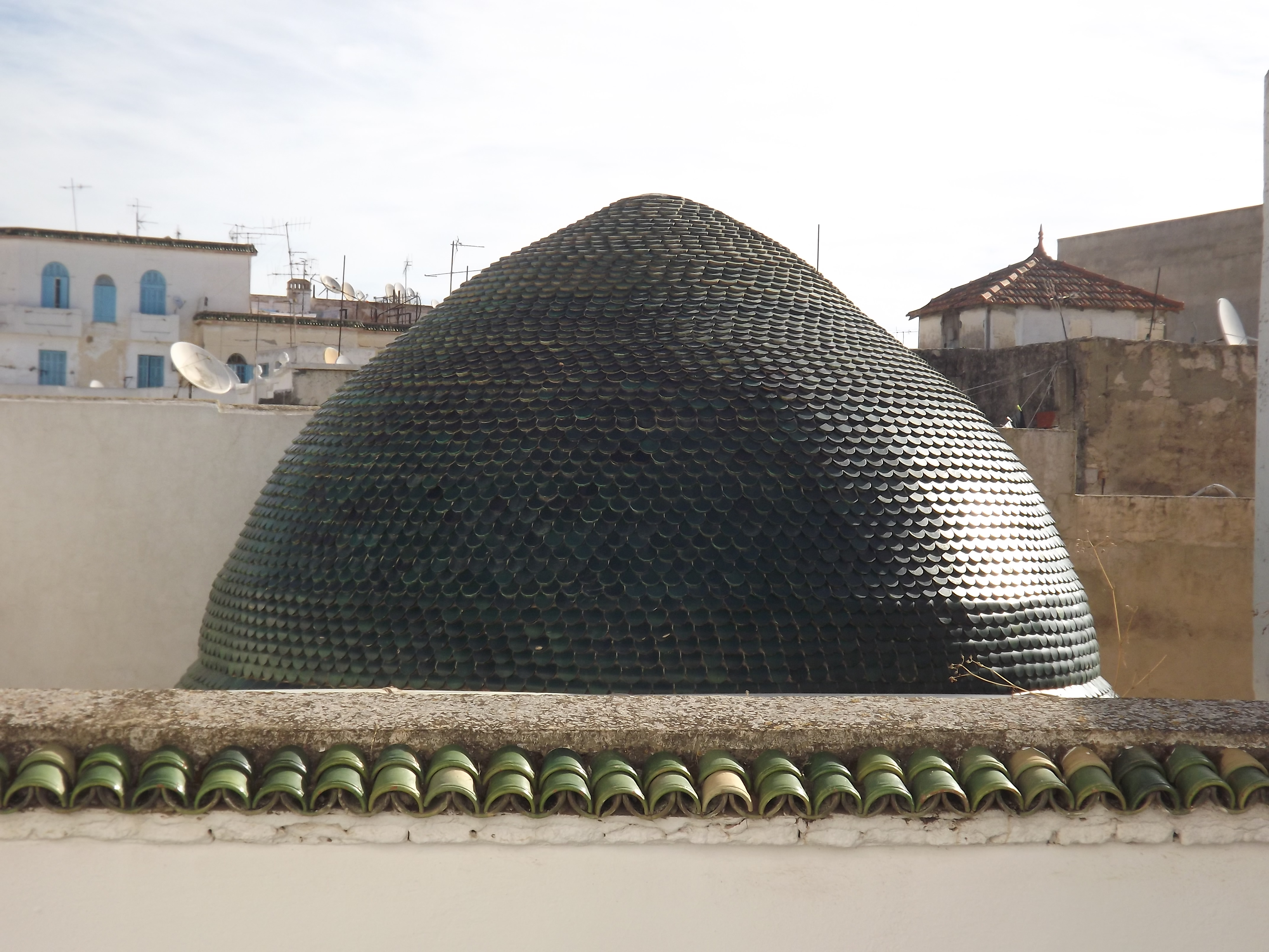 Coupole de tourbet el jaziri en face du dar lasrem